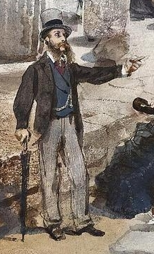 detail: Self-portrait